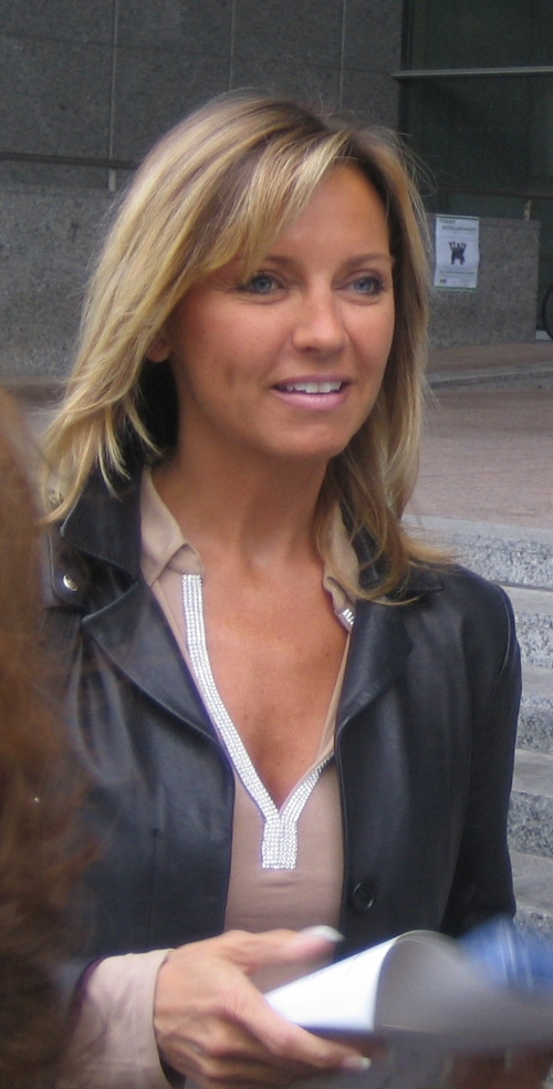 Frédérique Ries devant le Parlement européen pour rencontrer les associations de défense de l'environnement au sujet du Règlement REACH sur l'Enregistrement, l'Evaluation et l'Autorisation des produits chimiques.